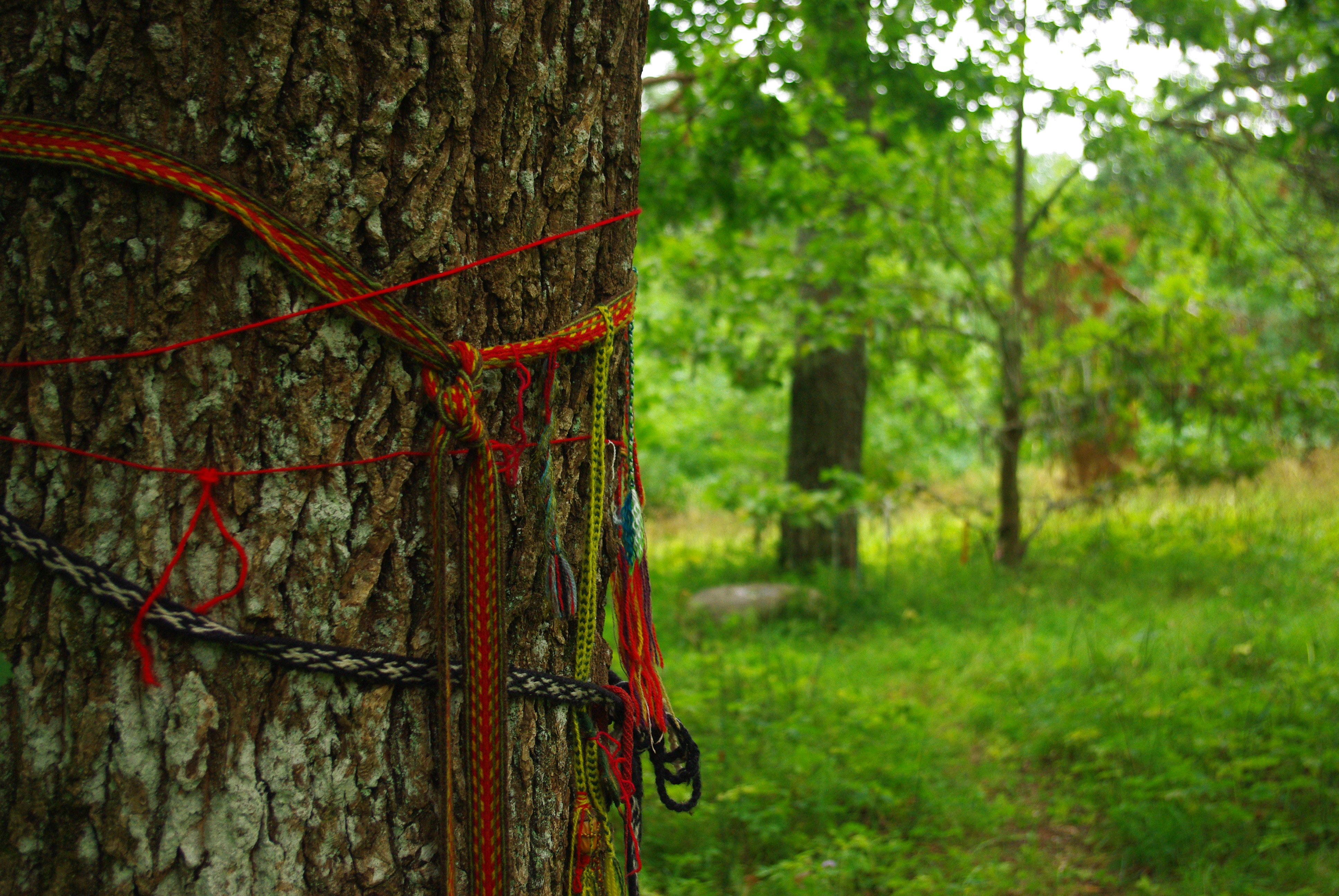 Vana hiietamm annipaeladega Lääne-Virumaa Viru-Nigula valla Samma küla Tammealuse hiies. Tagaplaanil ohvrikivi.